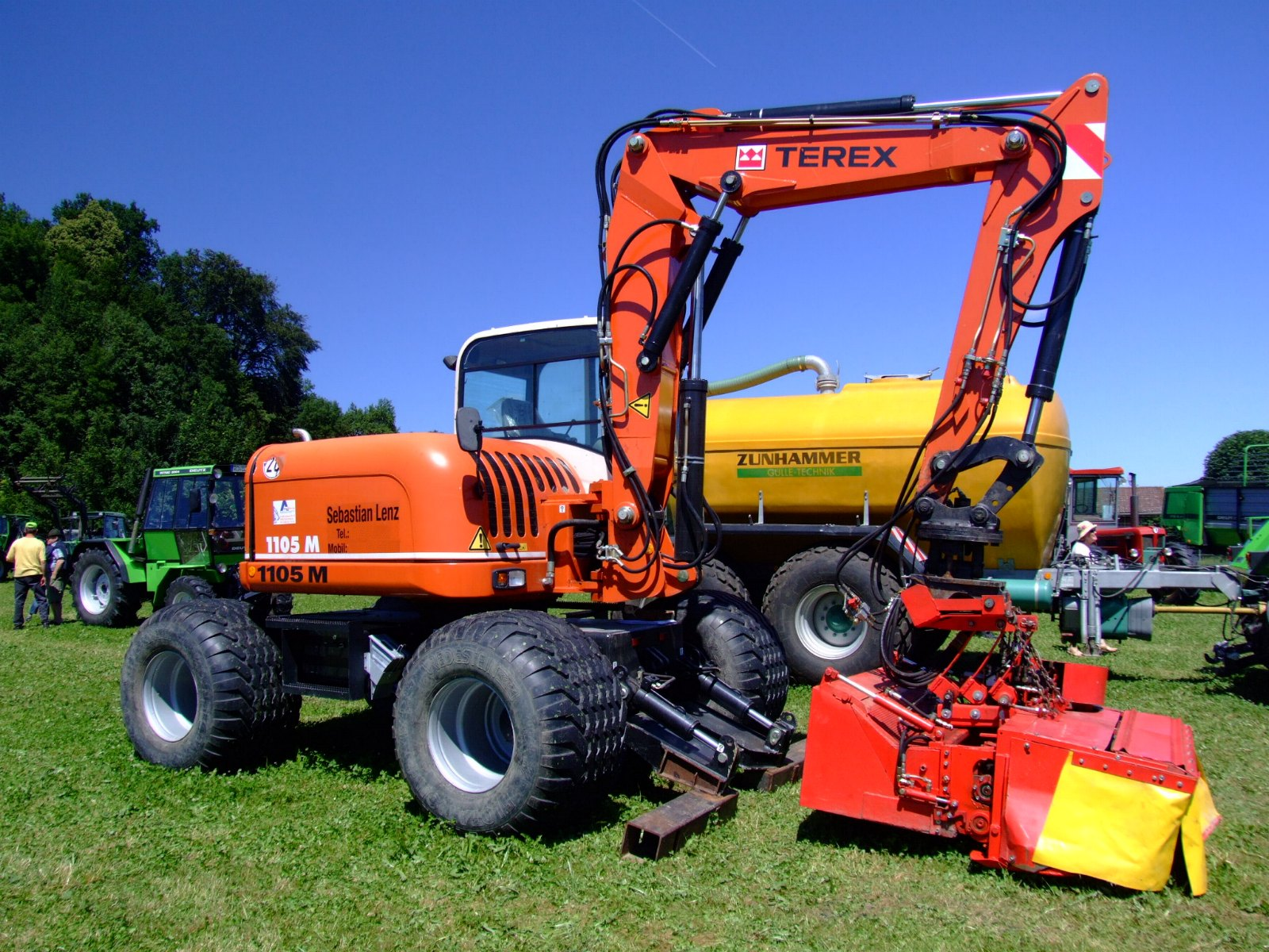 Ein Atlas-Terex-Mobilbagger 1105 M mit per Schnellwechselrahmen (Schnellkuppler) schmimmend sowie dreh- und schwenkbar am Hydraulikausleger befestigtem Teller-Scheibenmähwerk (Pöttinger?) mit Fangkorb für den Einsatz z.B. an Entwässerungsgräben oder Böschungen; im Hintergrund ein Zunhammer-Gülletankwagen, links ein Deutz-Fahr INtrac, rechts ein Schlüter-Traktor